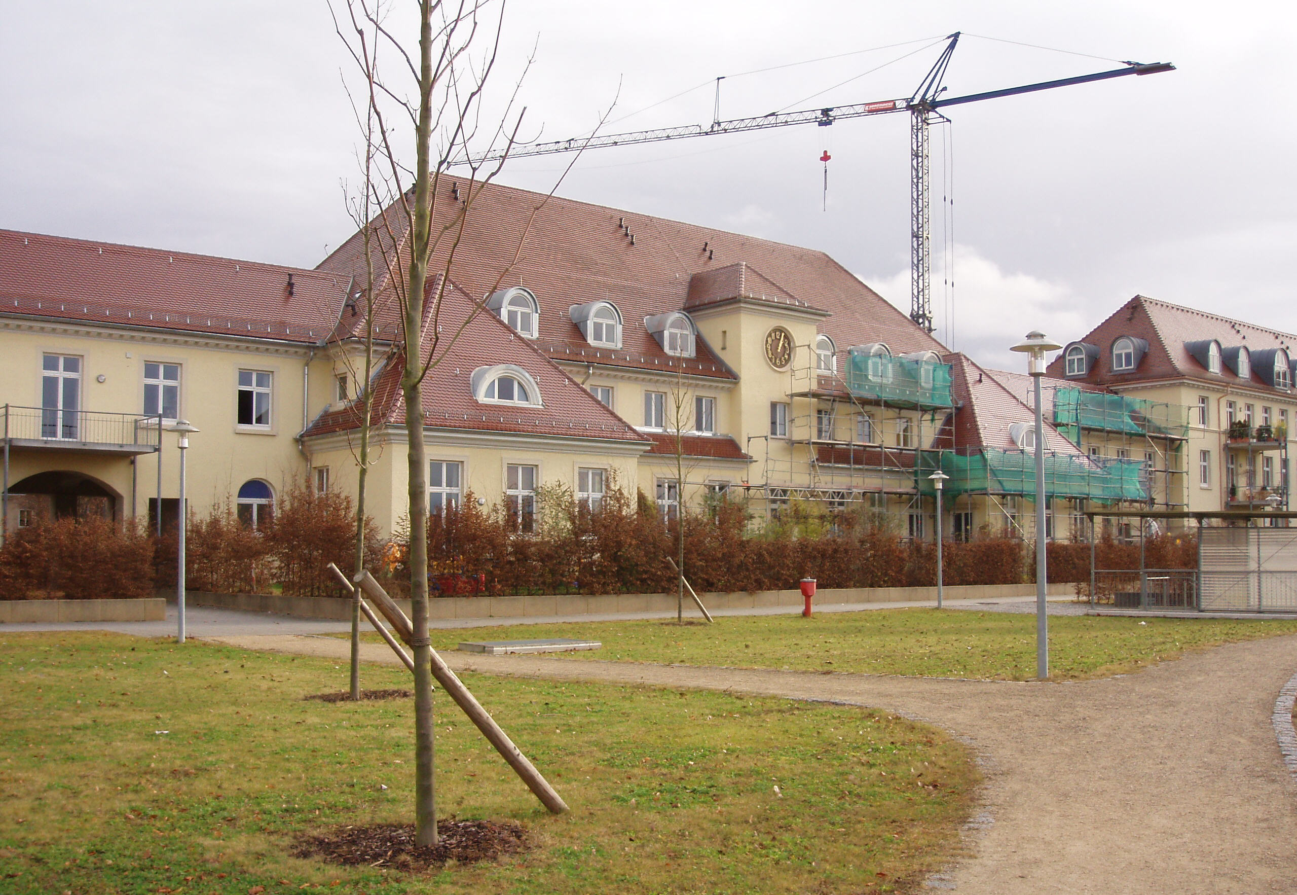 ehemalige Becelaere-Kaserne, vom Innenhof aus Richtung Tobias-Maier-Str. gesehen